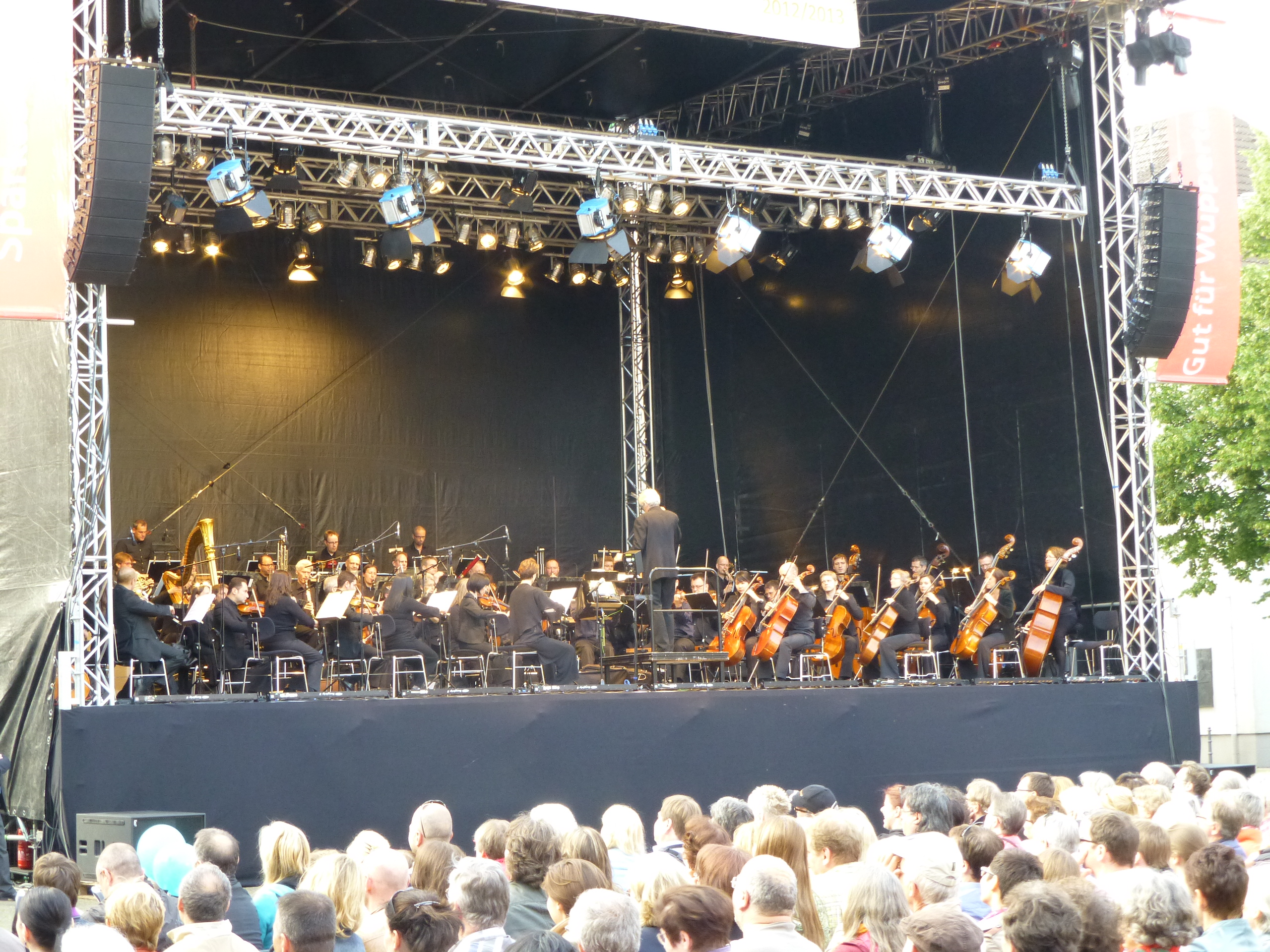 Open-Air-Konzert des Sinfonieorchester Wuppertal am 12. Juli 2013 ab 20:00 auf dem Laurentiusplatz, Wuppertal. Geboten wurde Stummfilm & Livemusik, Charlie Chaplin: "Modern Times"